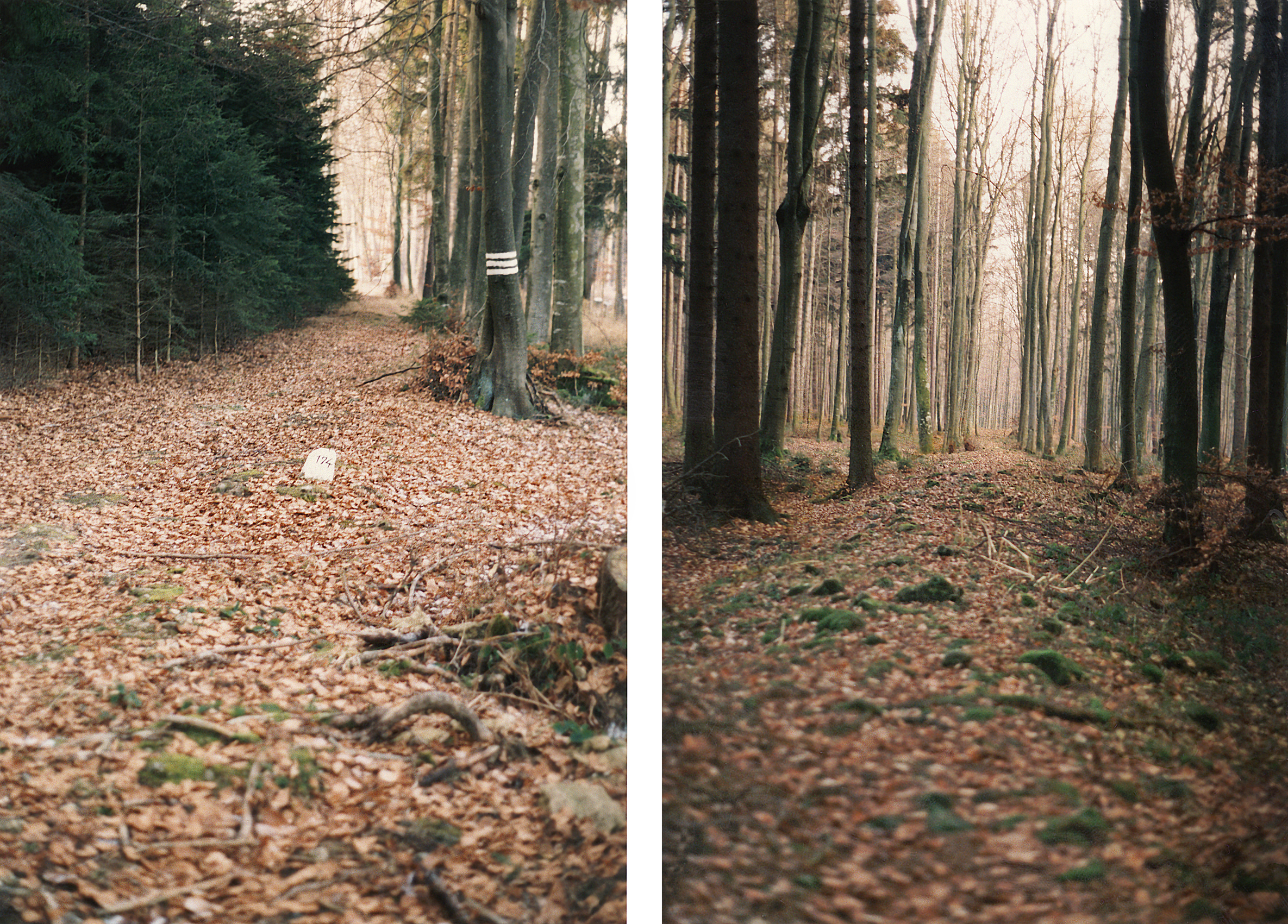 Die rätische Limesmauer zwischen WP 14/75 und WP 14/76 (links) und zwischen WP 14/76 und WP 14/77 (rechts). Beidesmal mit Blick nach Nordwesten.